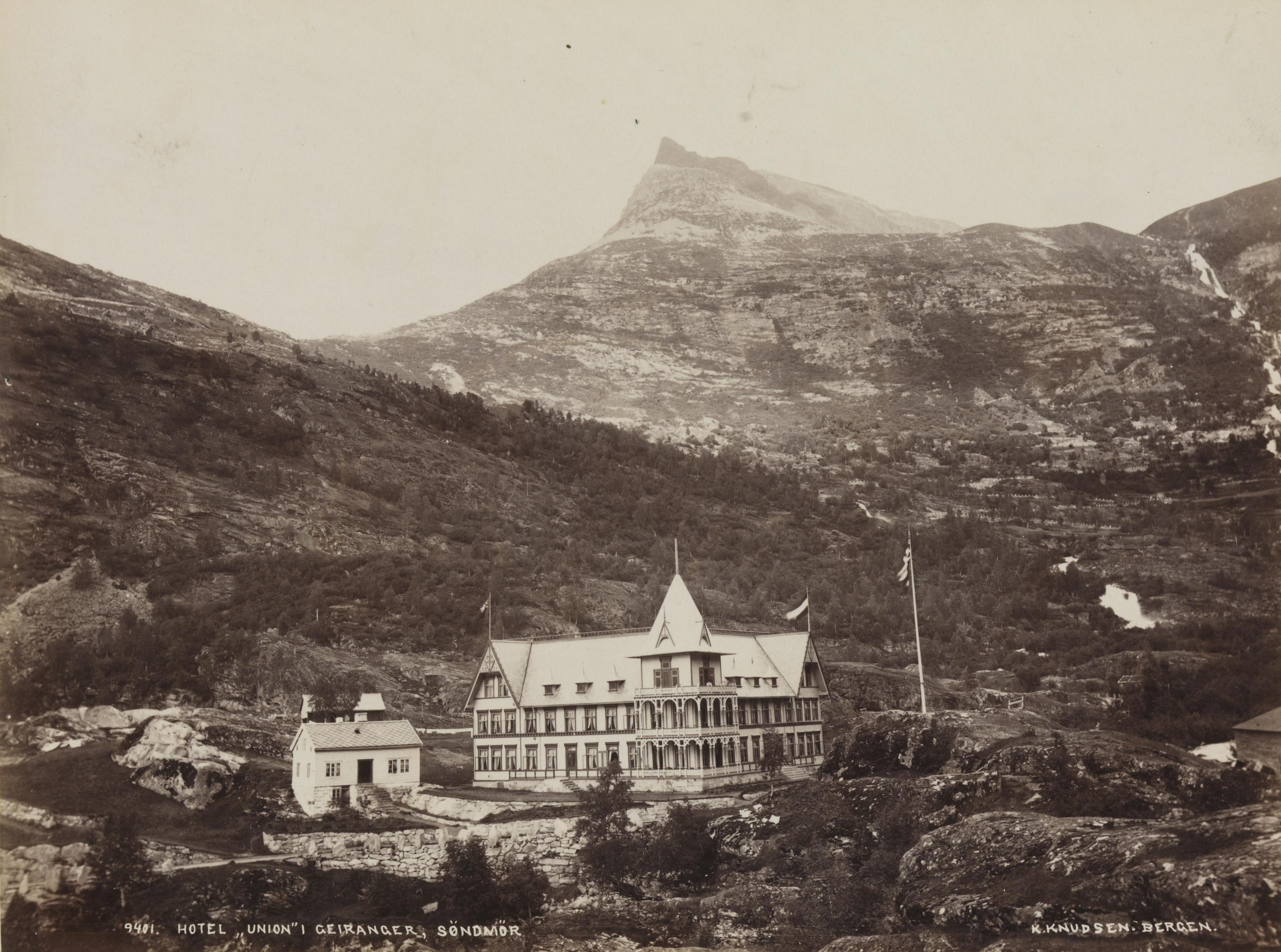 Bildet er hentet fra Nasjonalbibliotekets bildesamling Geiranger,Hotel Union, Stranda, Møre og Romsdal